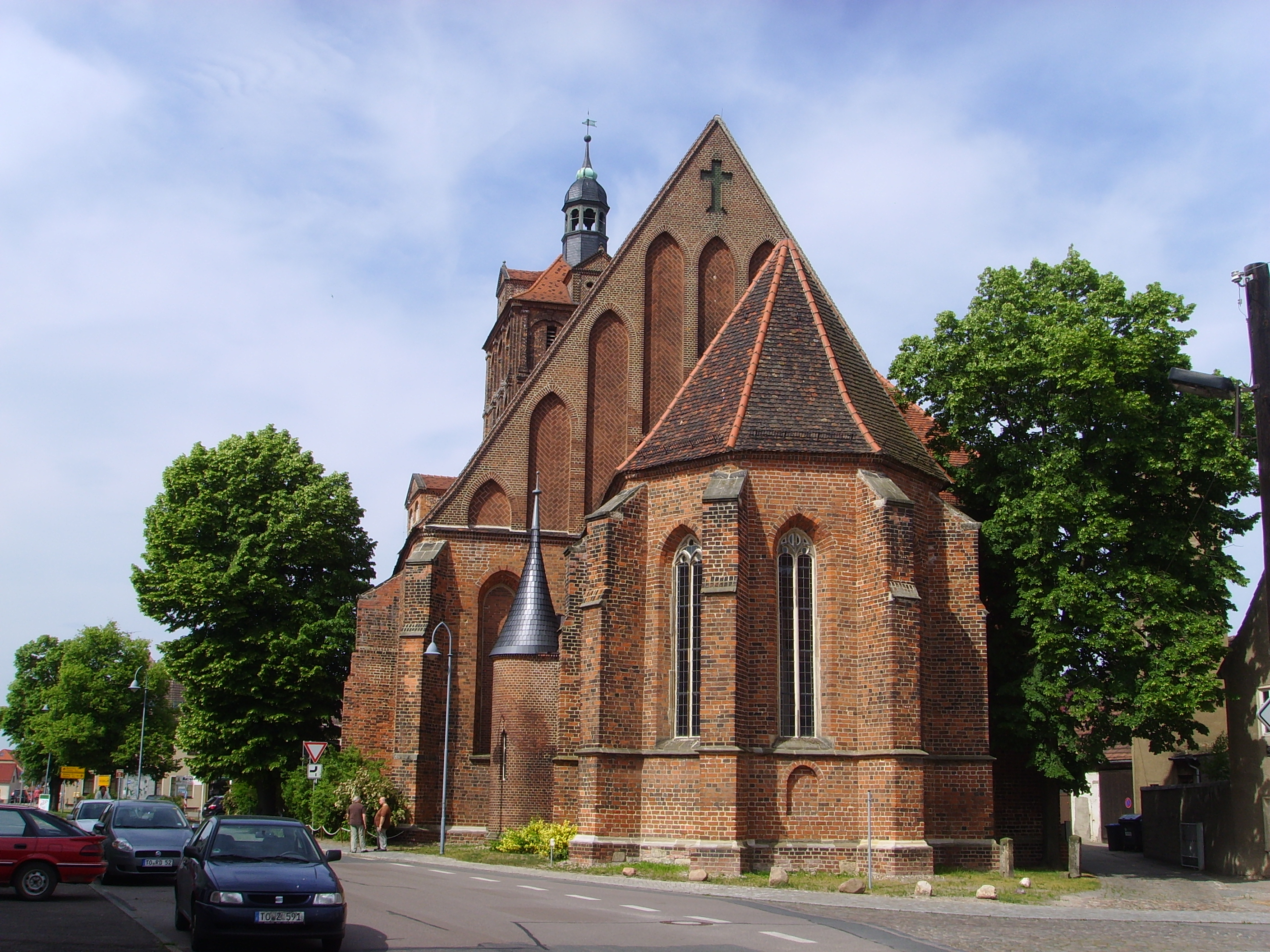 Kirche in Dommitzsch